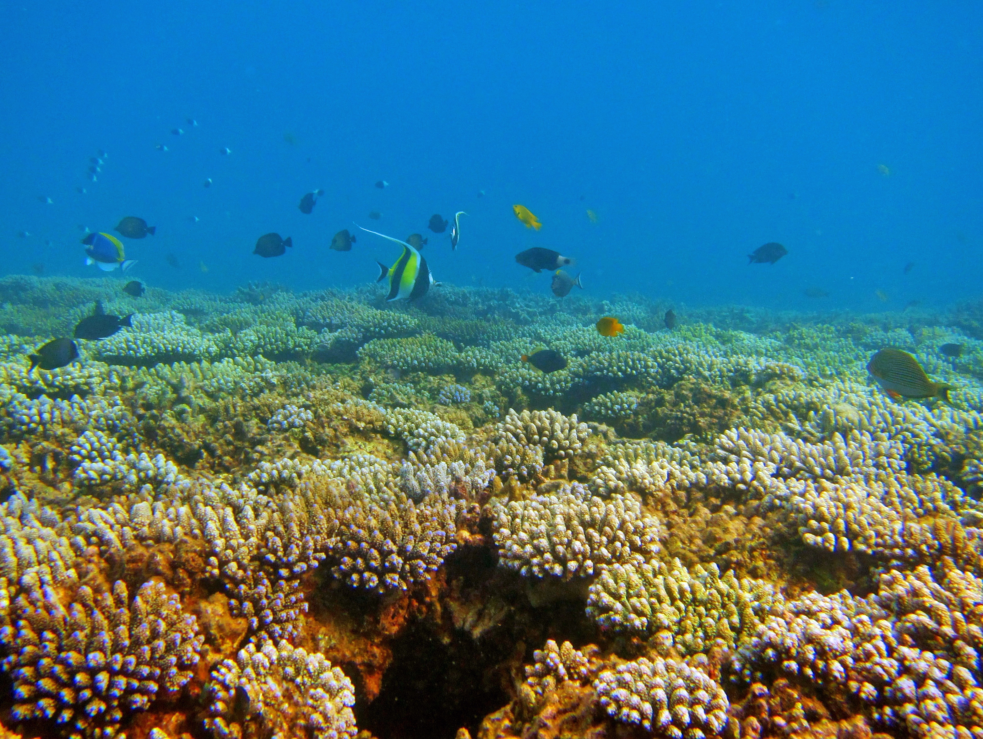 Le bout du platier corallien de Mayotte, à Sakouli.